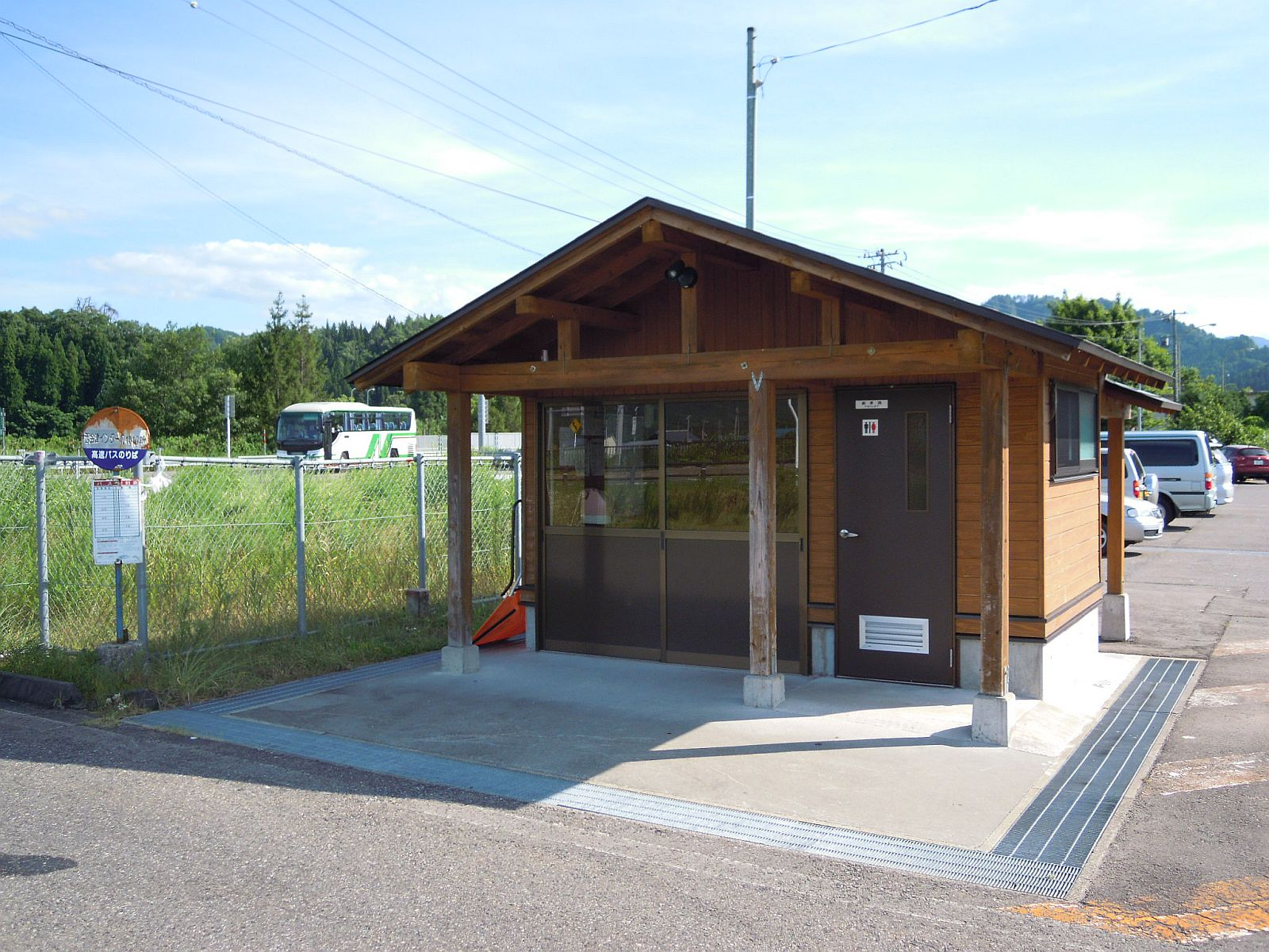 磐越自動車道西会津インターチェンジ敷地内に設置されている西会津バスストップ